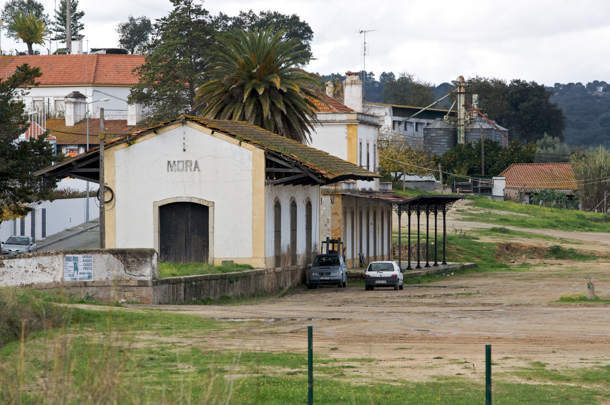 hoje sem comboios, mas com imagens — e servida por ecopista . Tipo: E [Estação] Local: Mora [Ramal de Mora , PK 176] Data e hora: 7 de Dezembro de 2009 [13h03]